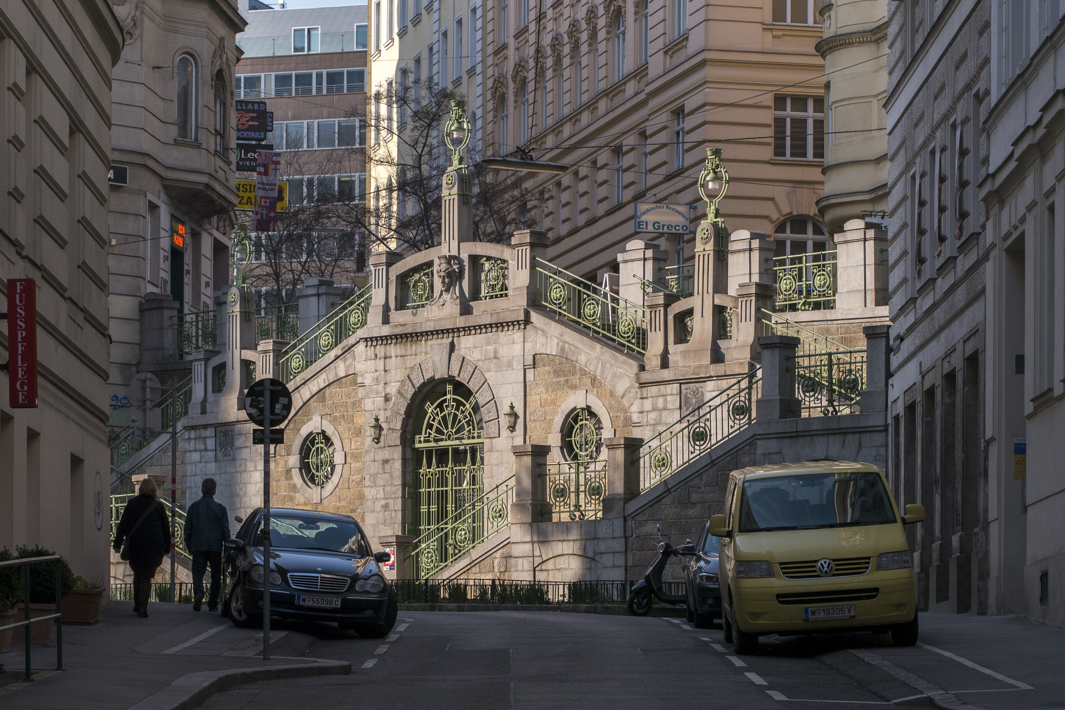 Fillgraderstiege